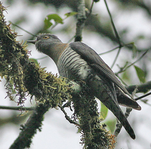 Himalayan Cuckoo Cuculus saturatus, Yongkola, Bhutan